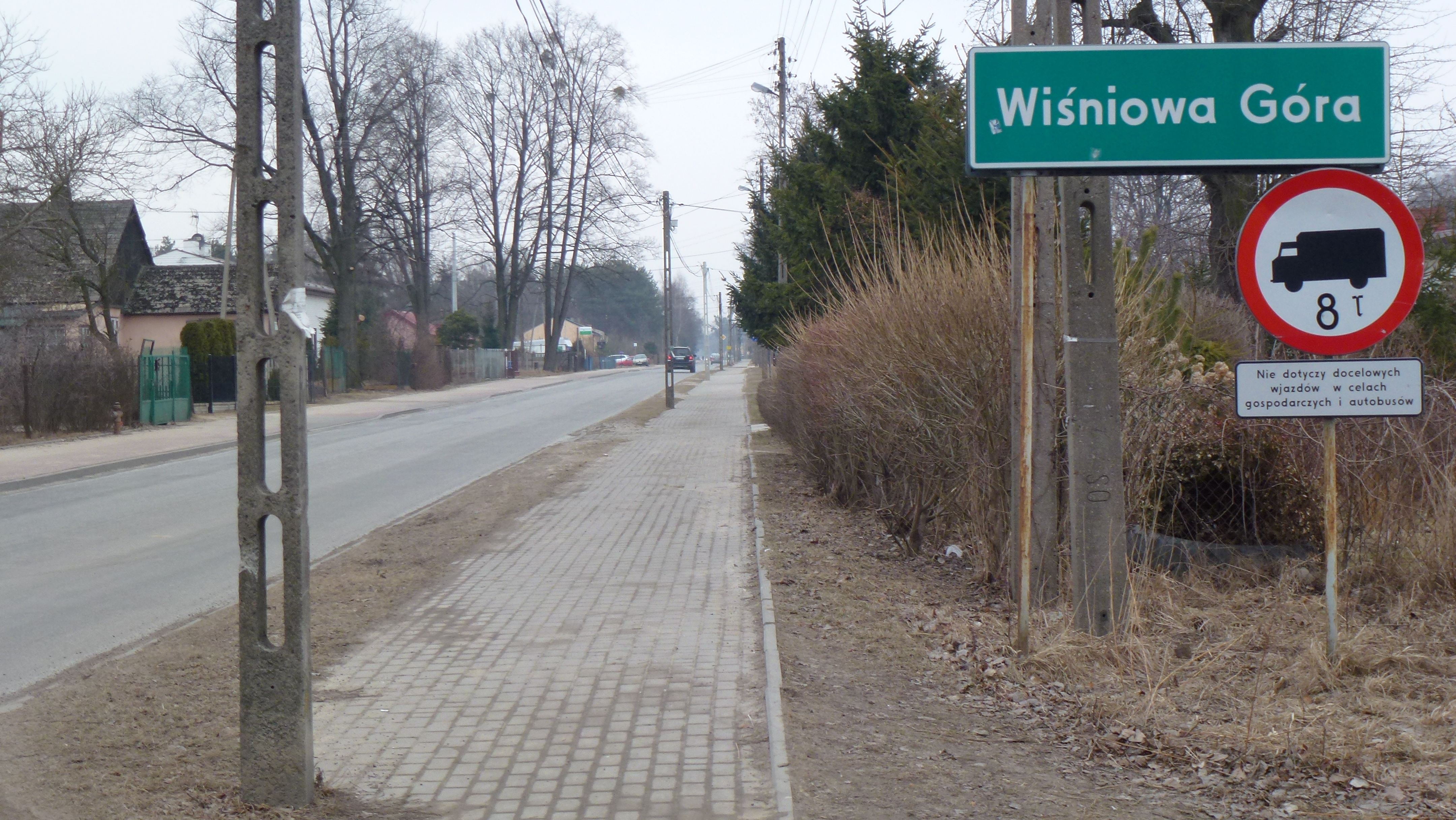 Wjazd do miejscowości Wiśniowa Góra